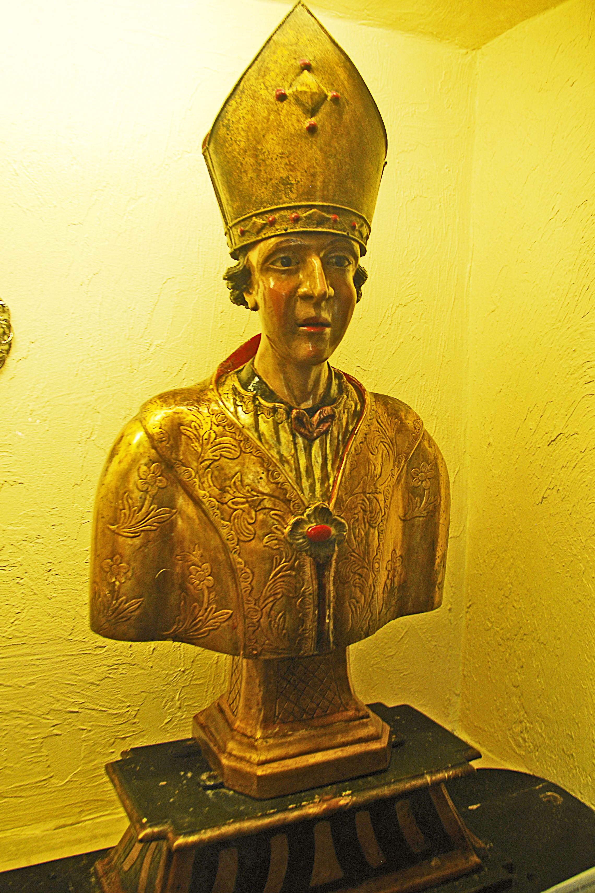 Kathedrale von Vence, Bischofsbüste (Reliquenschrein)